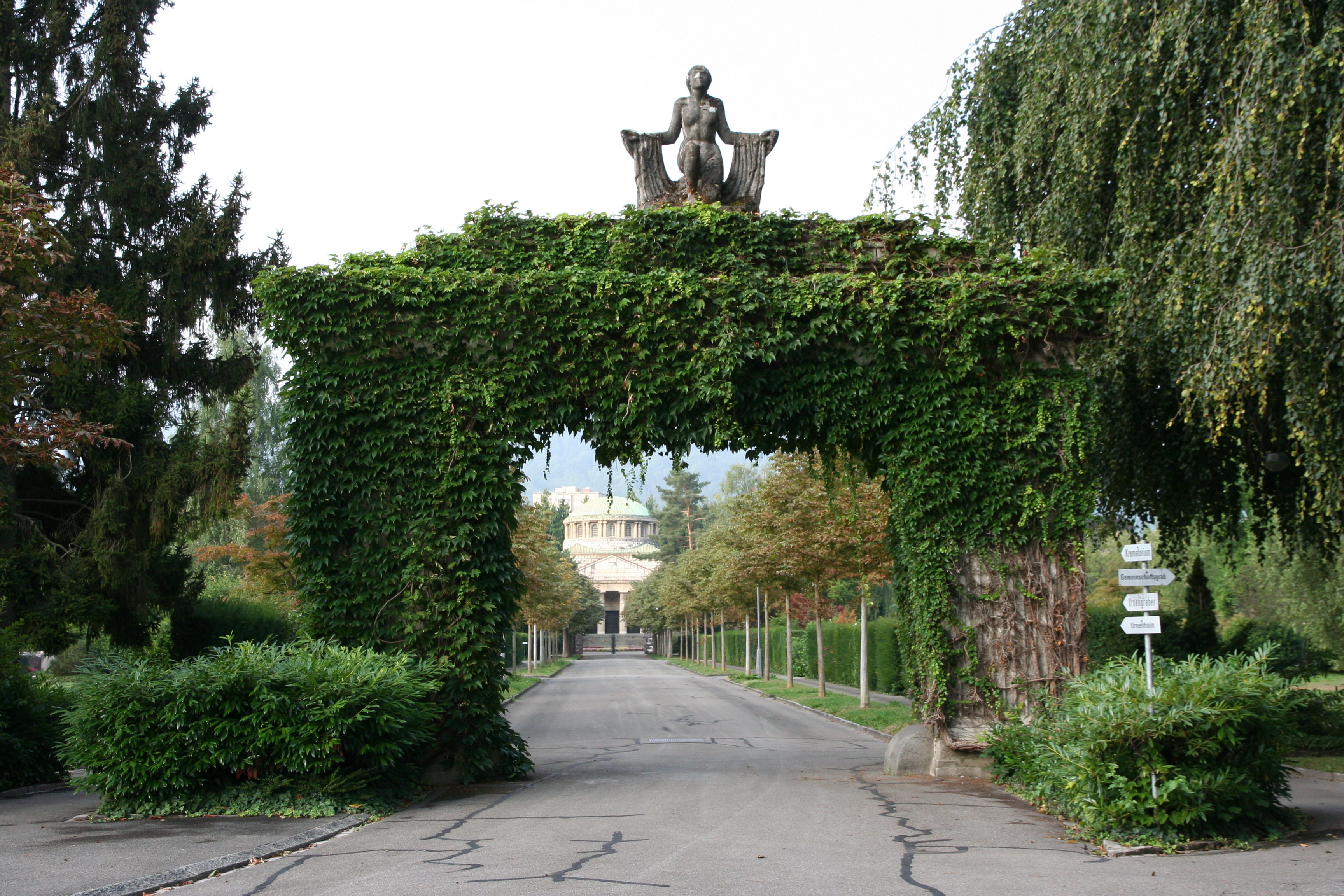 Friedhof Sihlfeld D